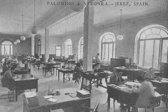 Büro von Palomino & Vergara, Jerez de la Frontera, Spanien